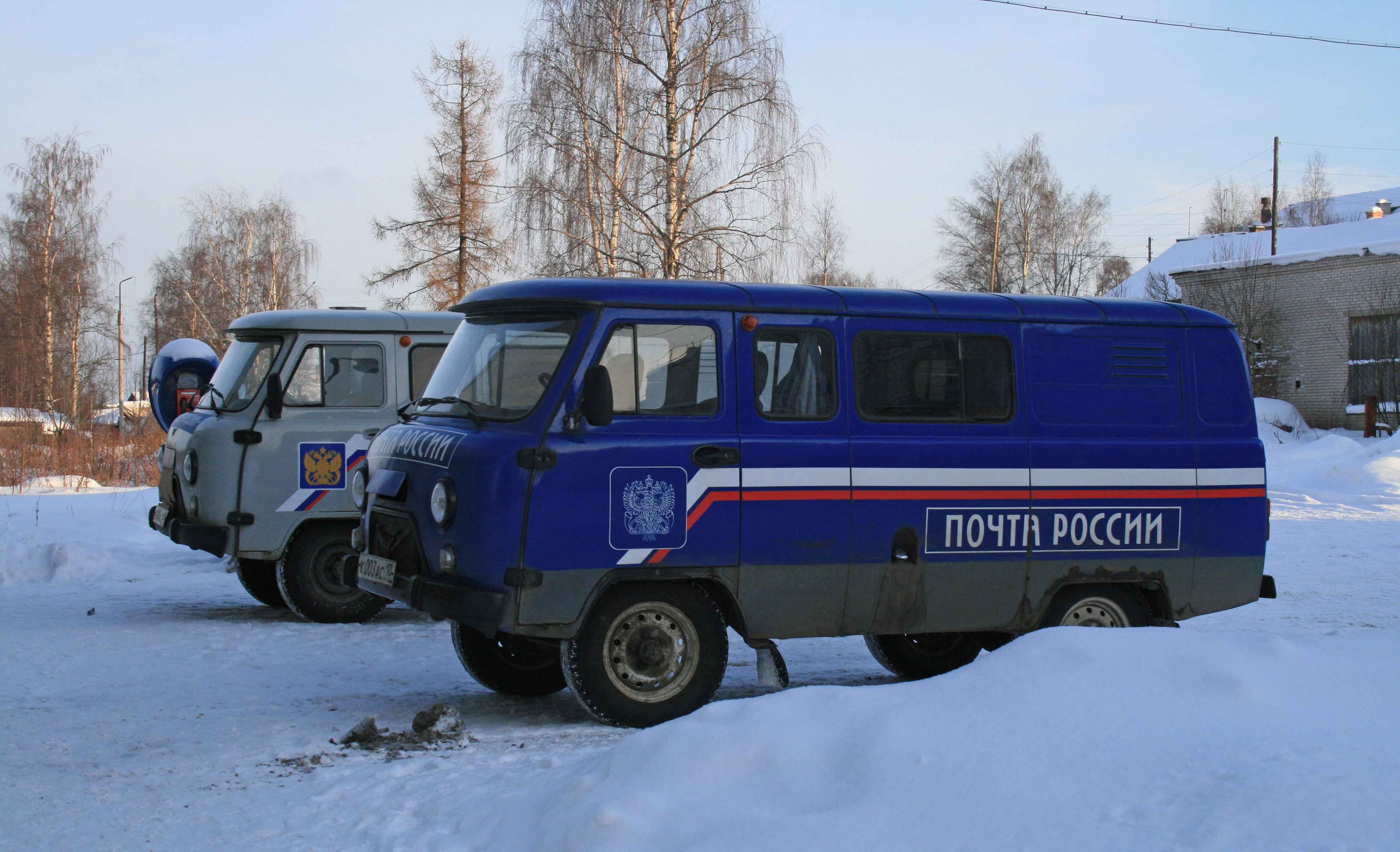 Автомобили УАЗ 3909 «Почты России» в посёлке Пряжа, Республика Карелия.